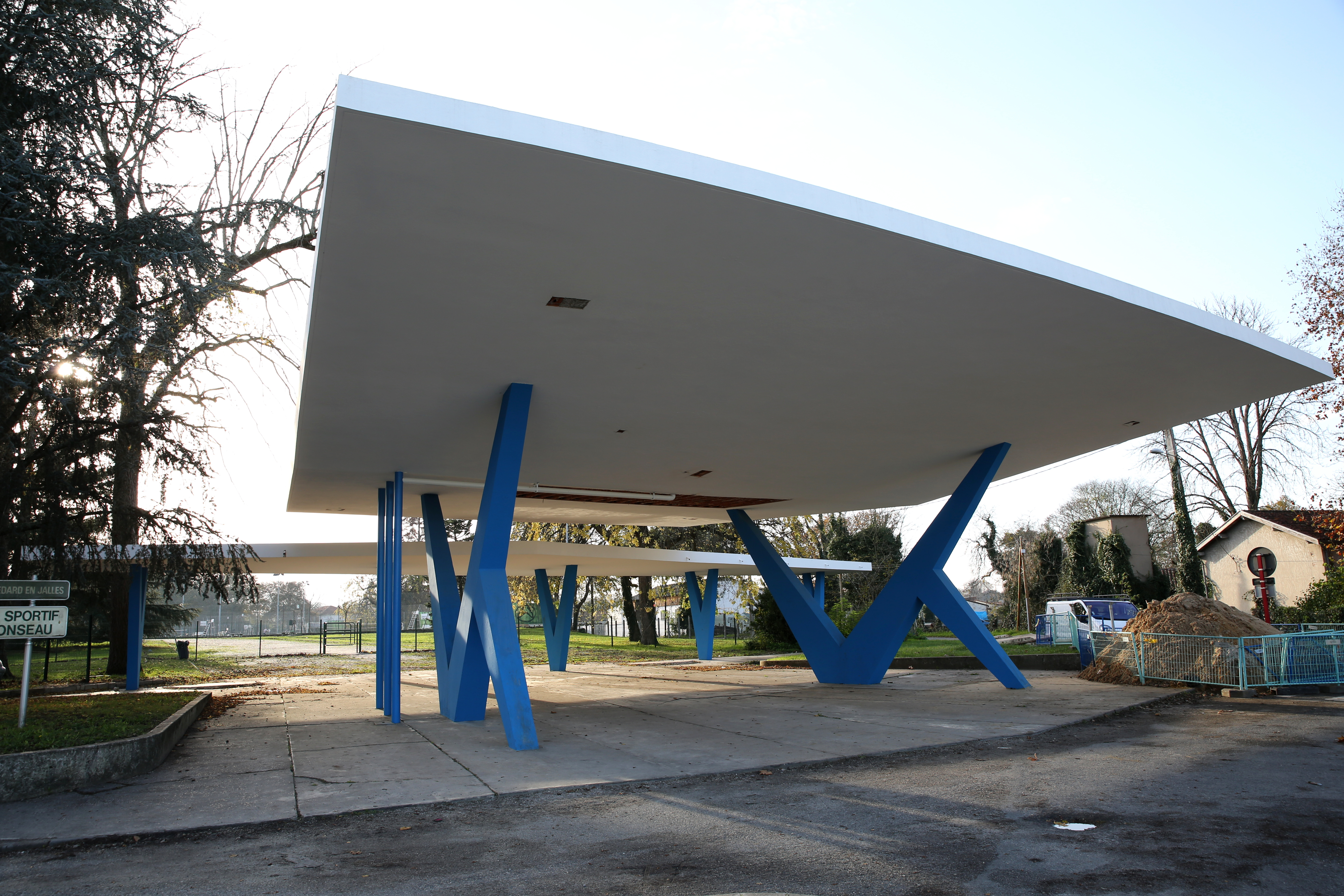 Entrée du stade Robert Monseau de Saint-Médard-en-Jalles, fraichement repeinte (de rouge en bleu) en 2014.